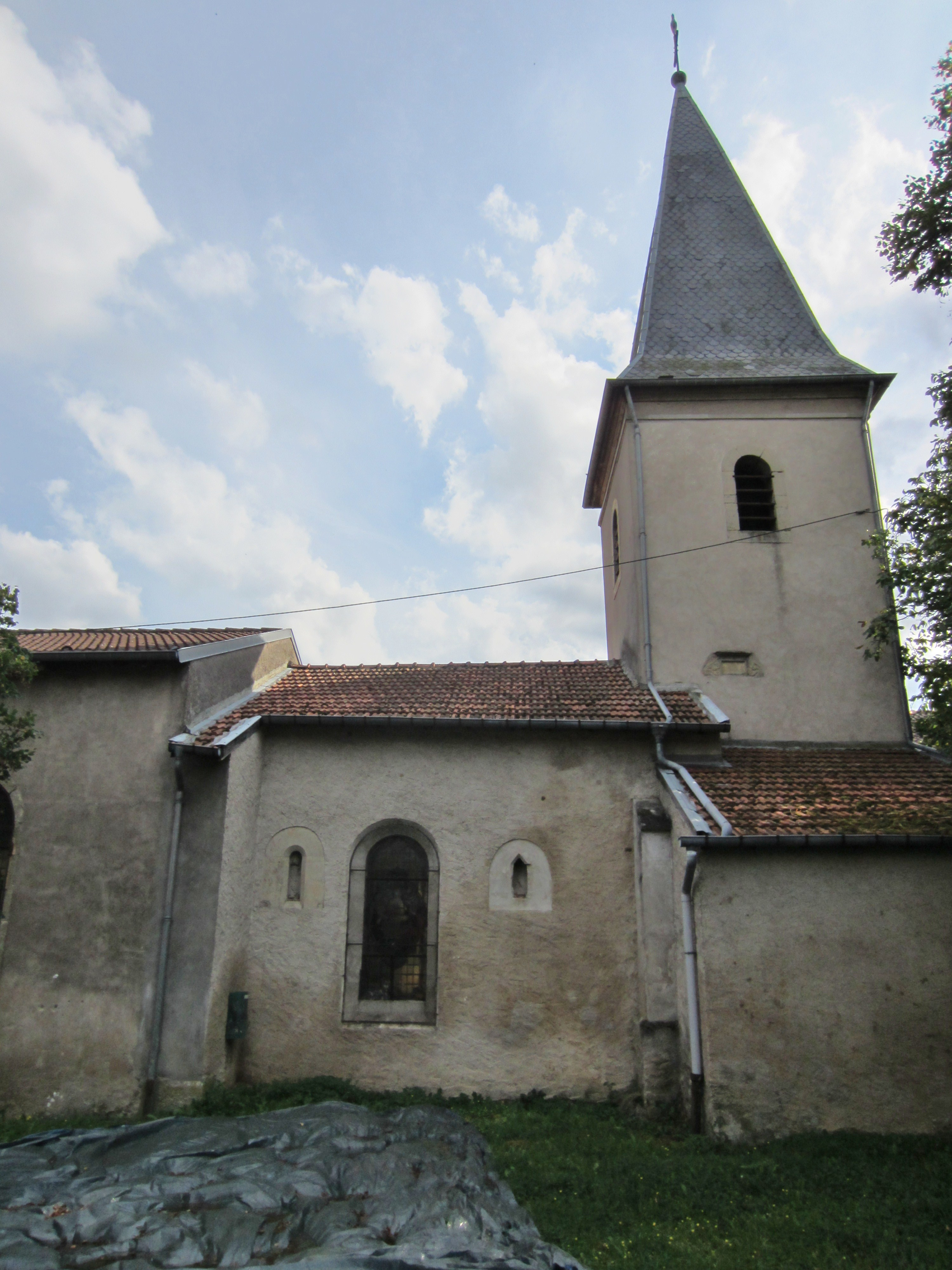 Description eglise Jaulny eglise Jaulny